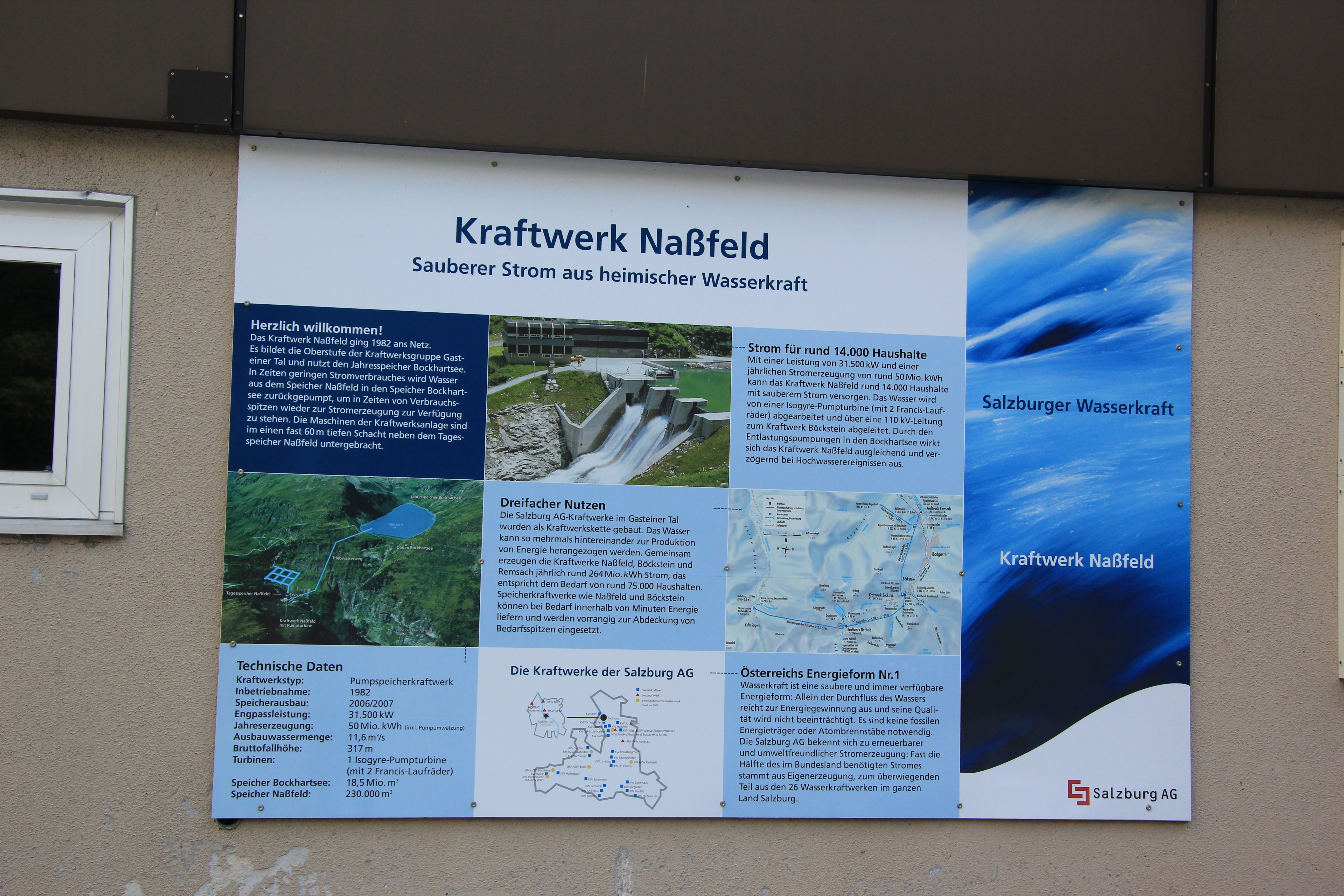 Darstellung der Kraftwerksgruppe Böckstein beim Kraftwerkes Naßfeld